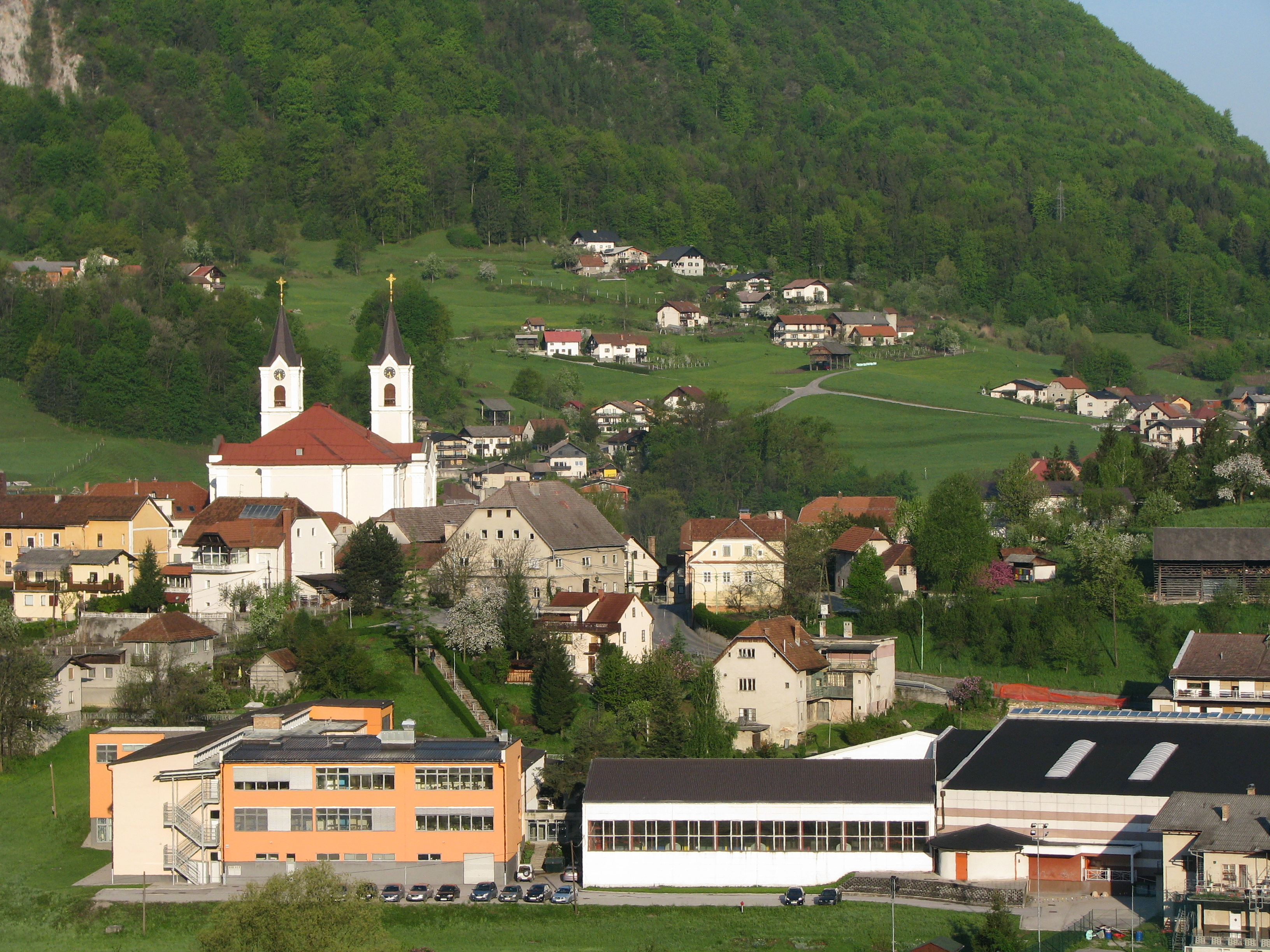 Zagorje ob Savi: Osnovna šola Ivana Skvarče in cerkev